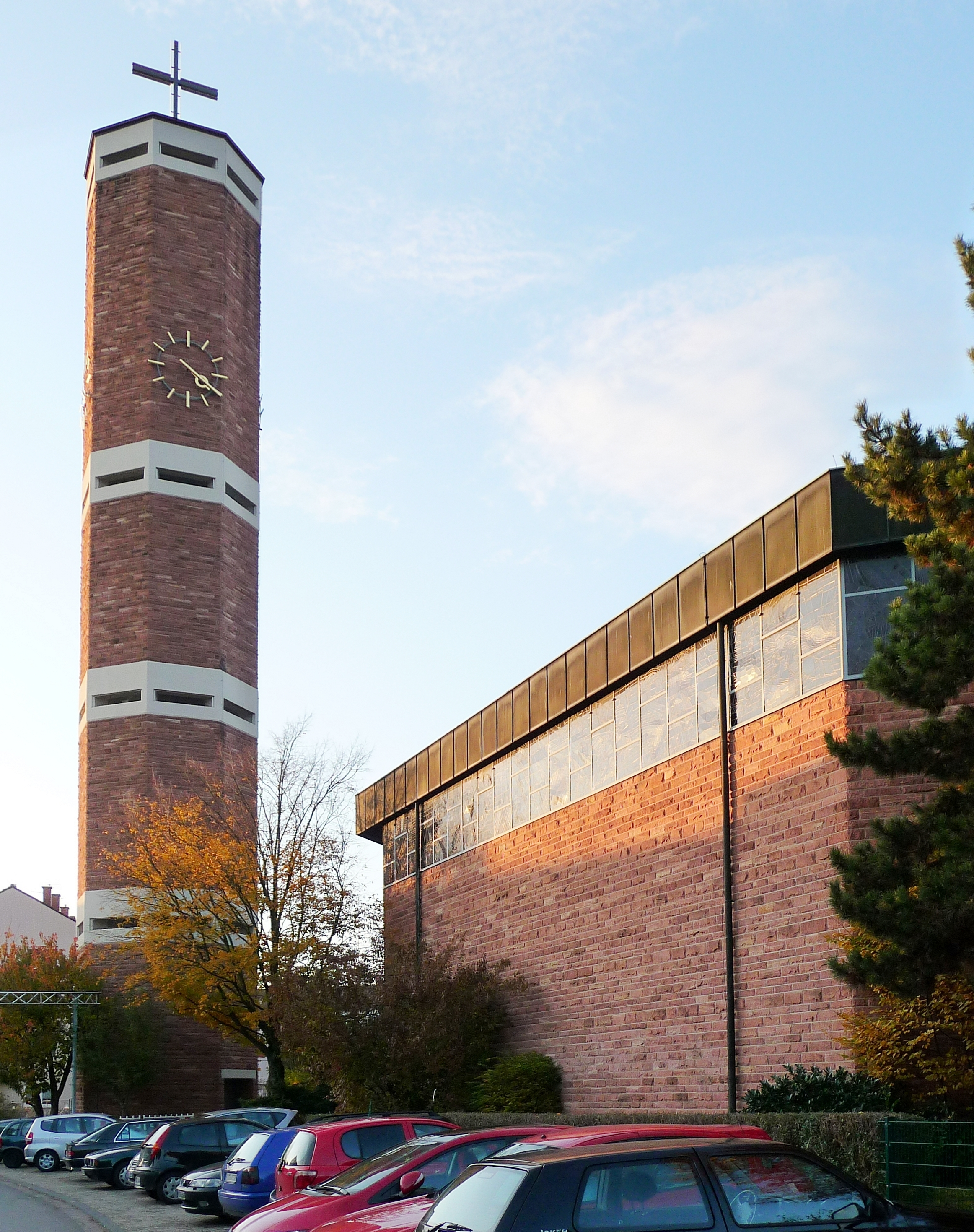 Katholische St. Johannes-Kirche mit freistehendem Kirchturm im Heidelberger Stadtteil Rohrbach (Baden-Württemberg, Deutschland)